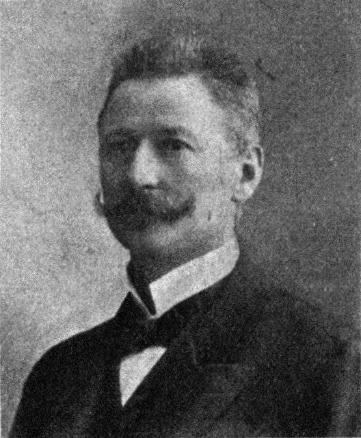 Österreichischer Politiker, Reichsratswahl 1907, Name siehe Dateiname